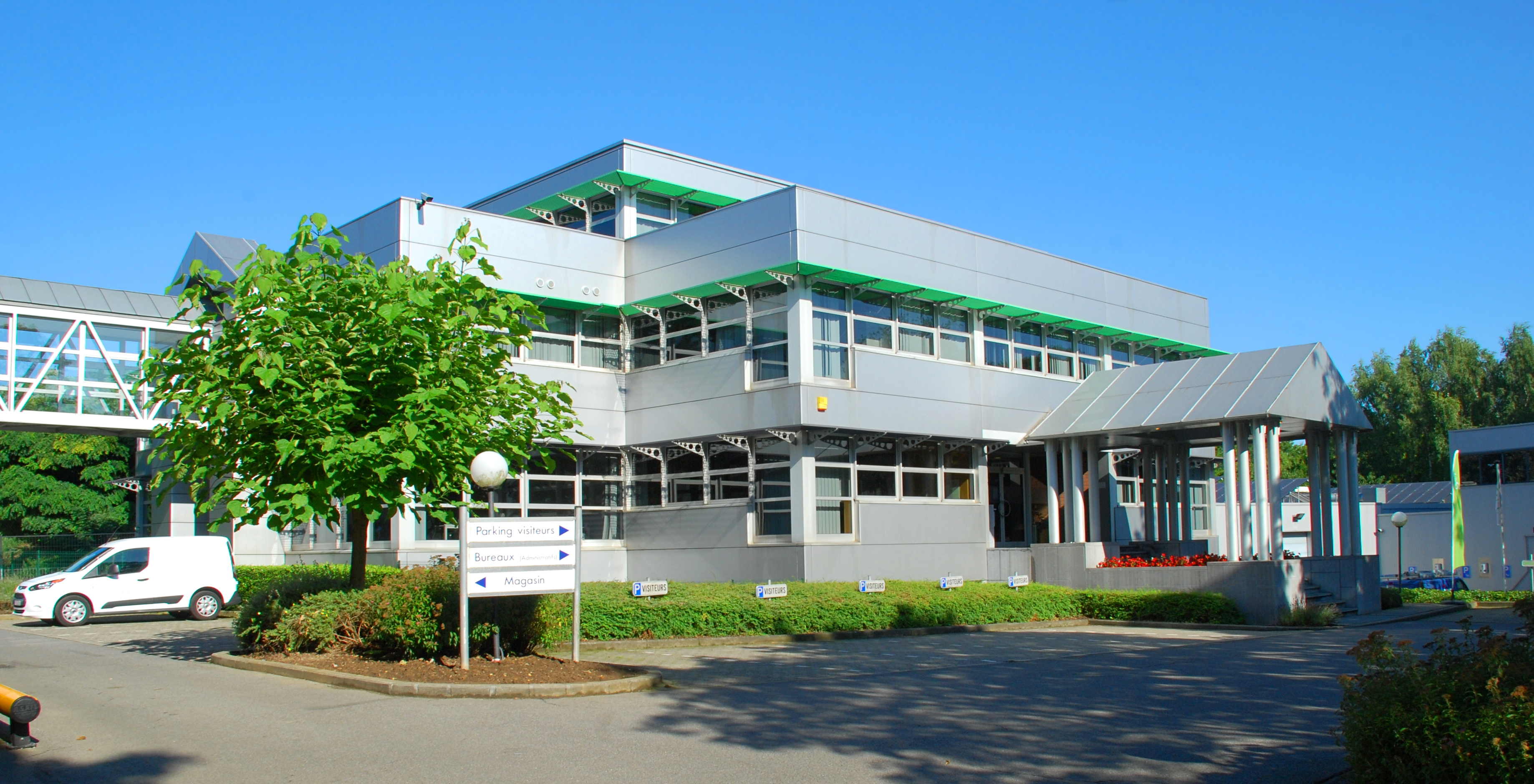 Belgique - Louvain-la-Neuve - siège d'IBA (chemin du Cyclotron 3 - Architecture postmoderne - DSW Architects 1991)